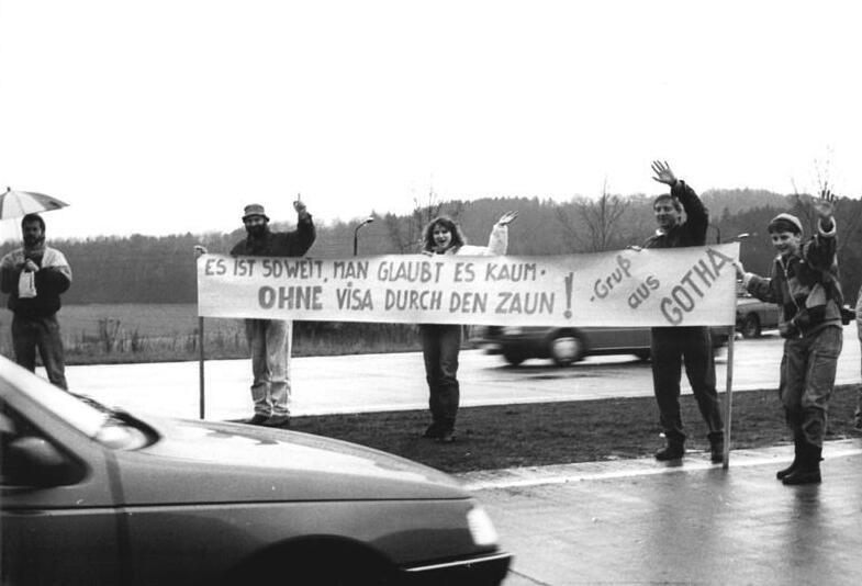 ADN-ZB-Ludwig-24.12.89-wb-Bez. Erfurt: Besucherverkehr-Wie hier an der Autobahn bei Wartha begrüßten die Erfurter an vielen Stellen ihre erstmals visa- und umtauschfrei einreisenden Gäste aus der BRD. An der Grenze boten sie Interessierten warme Getränke, Thüringer Rostbratwürste und Informationen an.